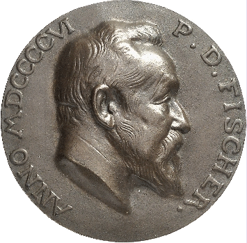 Diese Plakette wurde von Paul David Fischer anlässlich seines 70. Geburtstages, 1906, bei Adolf von Hildebrand (mit dem er auch verwandt war) in Auftrag gegeben. Eine kleine Anzahl von Plaketten wurde gegossen, und an Familie und Freunde geschenkt. Das vorliegende Exemplar wurde in 2014 bei einer Muenzauktion erstanden und danach fotografiert. Weitere Exemplare sind in Hamburger und Münchner Archiven/Museen.